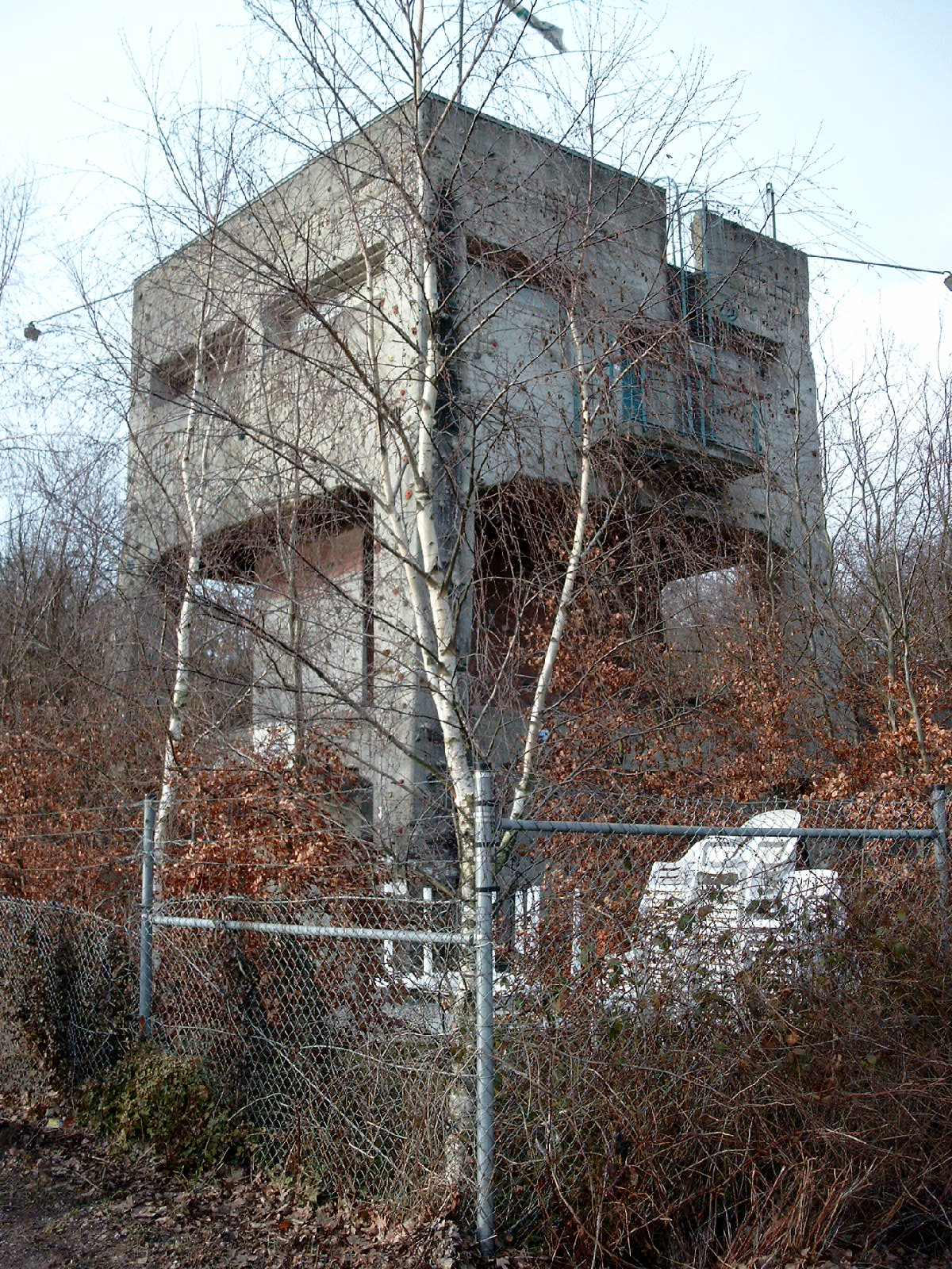 Verkehrsleitturm Fliegerhorst Venlo-Herongen/Niederlande